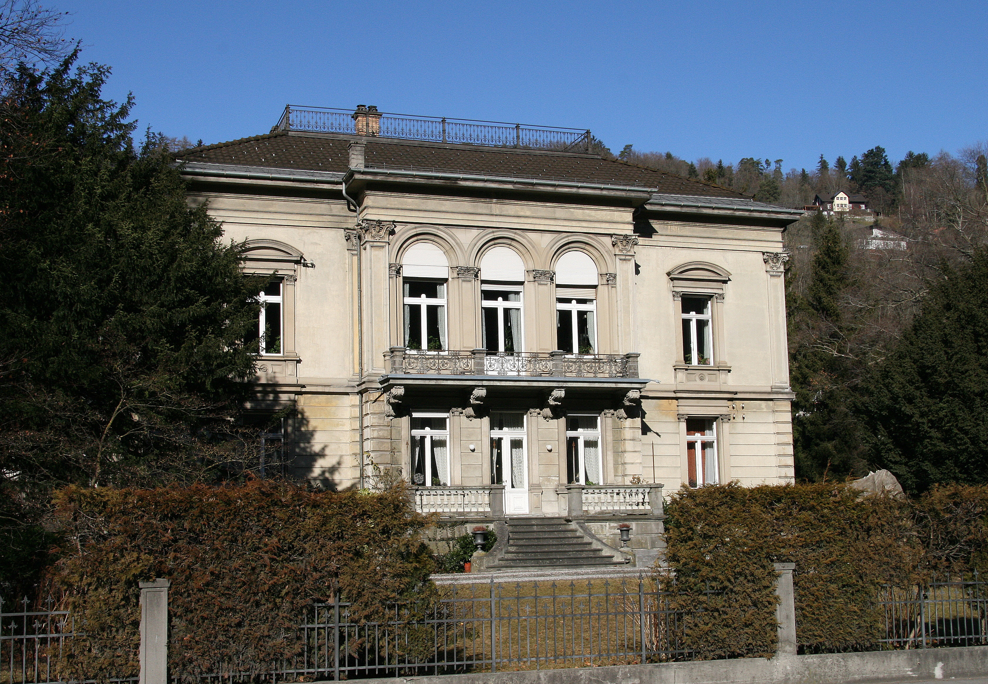 aus dem DEHIO Vorarlberg 1983: Reichsstrasse Nr. 168: Villa Getzner, erbaut 1882 von Hilarius Knobel in strenghistoristischen Stilformen in parkartigem Garten. Stark gegliederte Fassade, 3achsiger Mittelrisalit mit Rundbogenfenstern, Freitreppe, Ortpilaster mit Akanthuskapitellen; seitlich offene Veranda mit ionischen Säulen durch Eisenkonstruktion gedeckt; freistehende Remise mit hohen Rundbogenöffnungen. *** in Feldkirch.